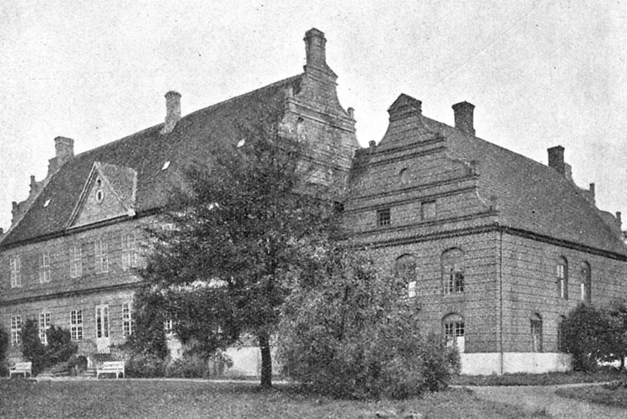 Juulskov er en gammel gård, den nævnes første gang i 1365, og ligger 6 km vest for Nyborg, i Kullerup Sogn, Vindinge Herred, Ørbæk Kommune. Hovedbygningen er opført i 1590 ved Dominicus Baetiaz